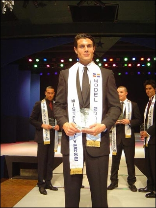 Ivan Cabrera Trigo, desfilando como Mister Universo.